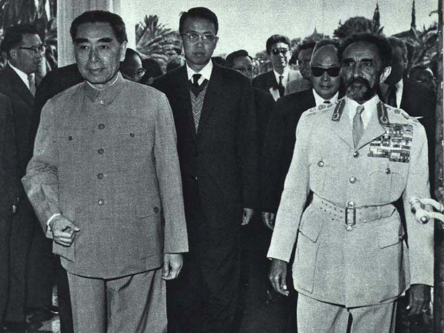 1964-04 1964年1月30日 中国访问埃塞俄比亚 周恩来与海尔·塞拉西一世